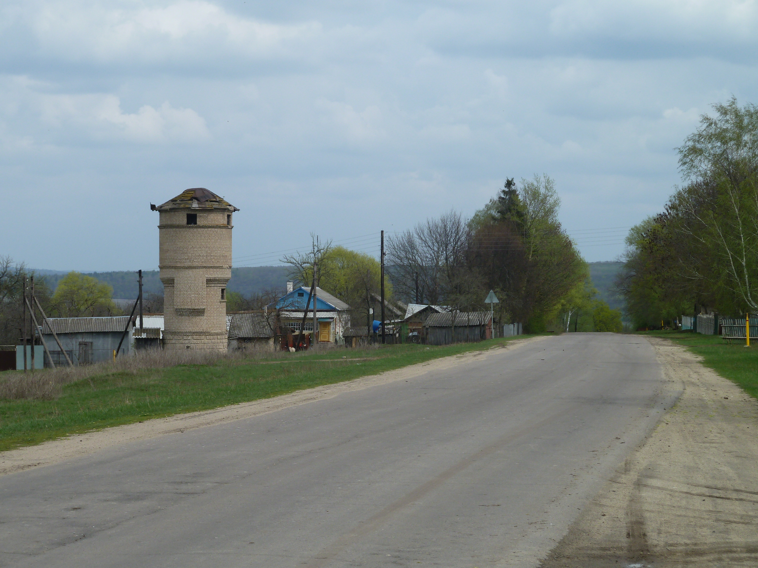 1-я водонапорная башня 1957-го года